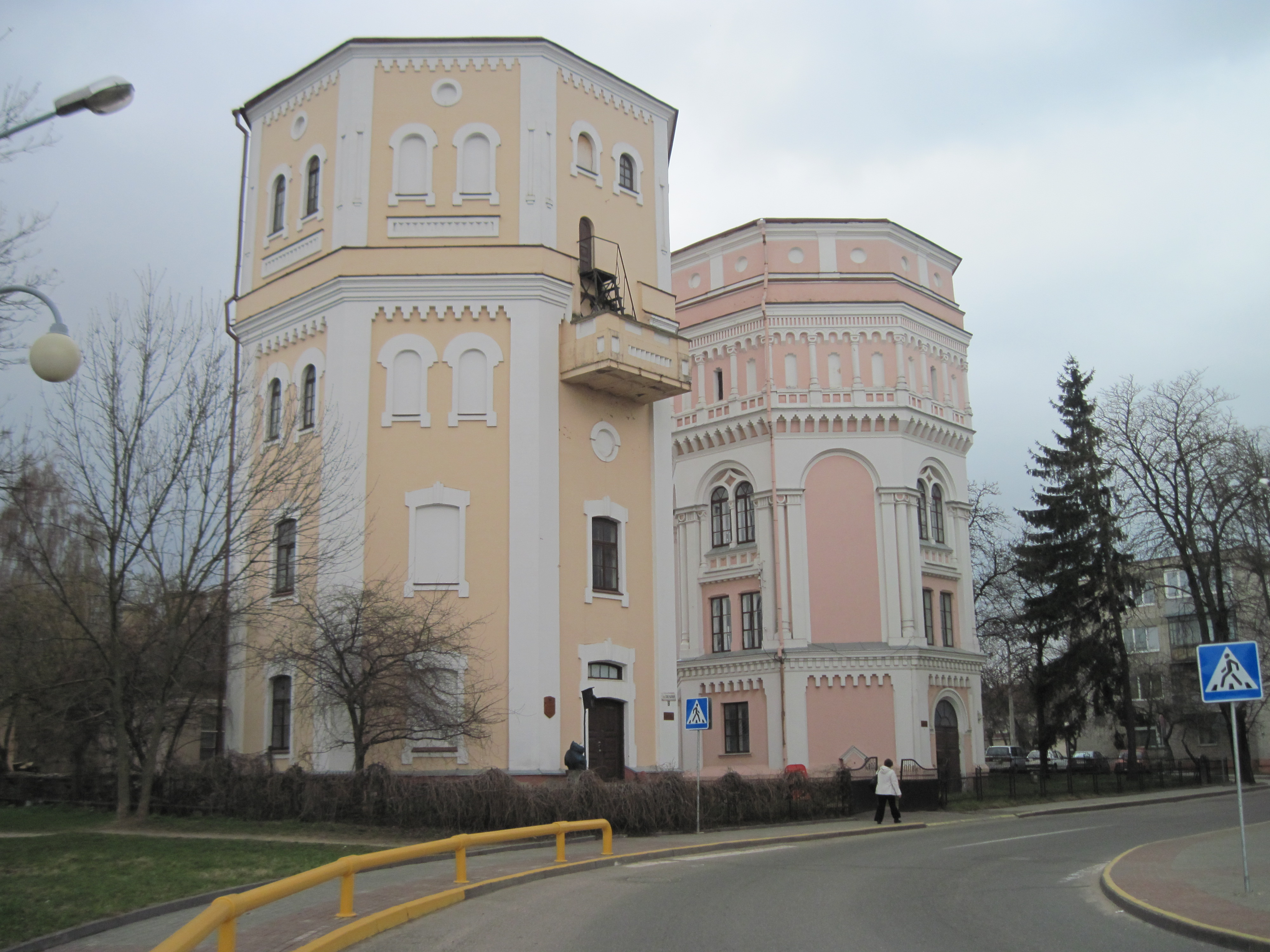 Беларуская (тарашкевіца): Вадацяжныя вежы ў Гродне